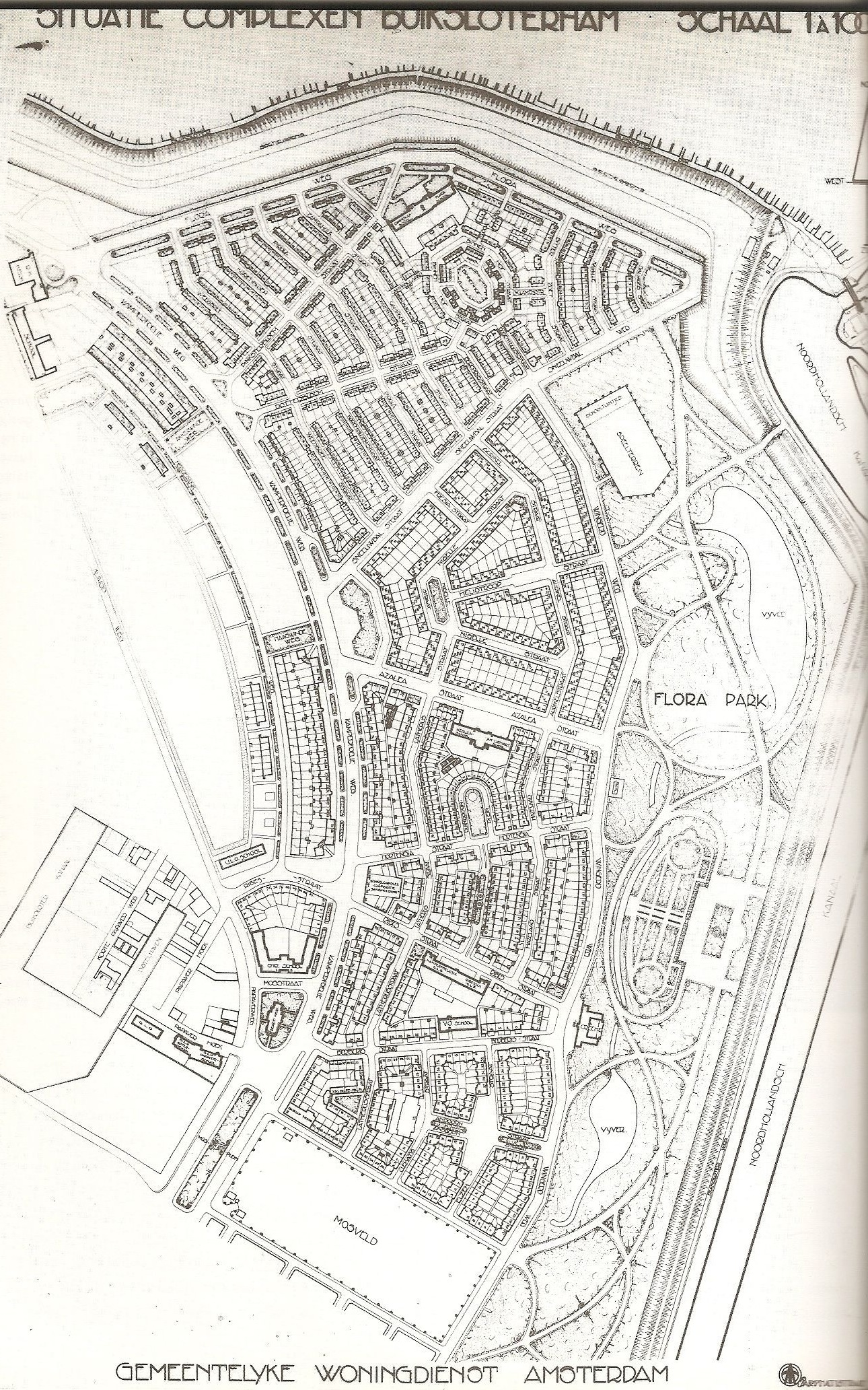 Tuindorp Buiksloterham, Amsterdam-Noord. Tegenwoordig Bloemenbuurt Amsterdam, Floradorp, Latherusbuurt, Mosveld, Mosplein, Noorlandercomplex, Florapark, Pieter van Hasseltweg, Noorderpark.